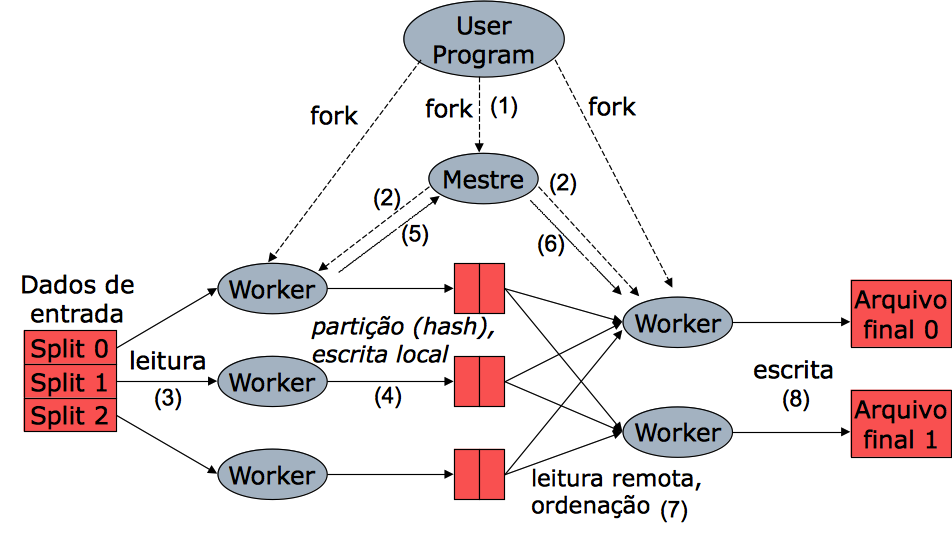 Representação do ambiente de execução do Hadoop.